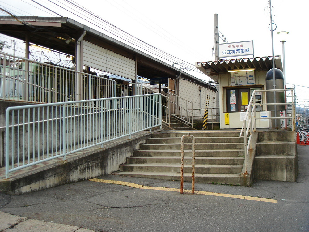 Oumi Jingu-mae station